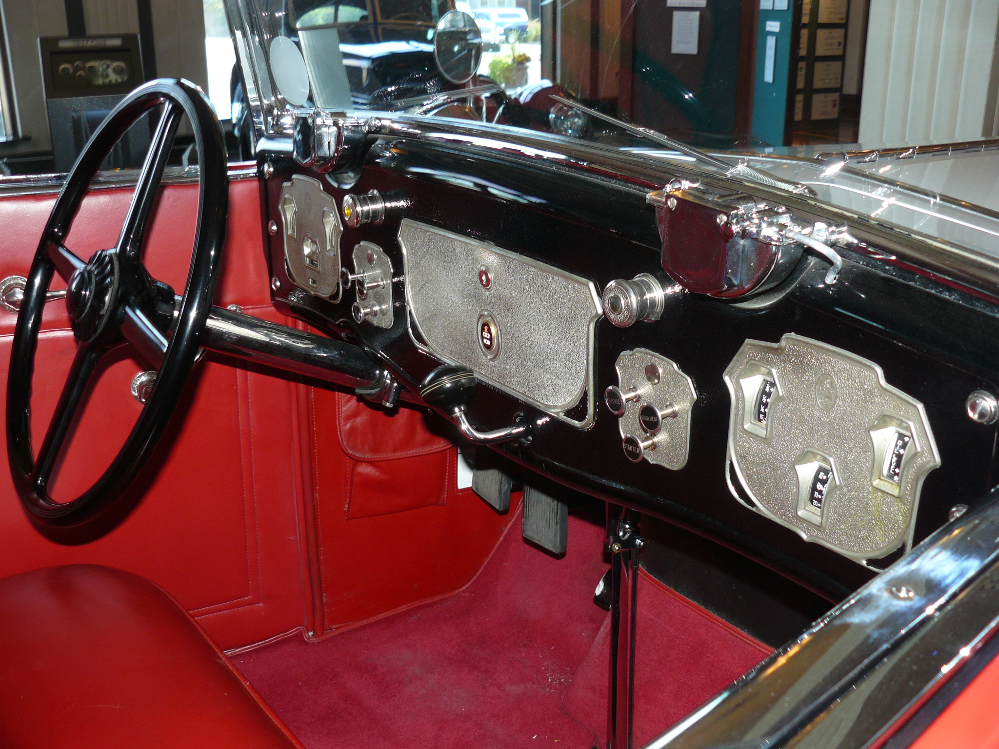 Auburn Museum 2013